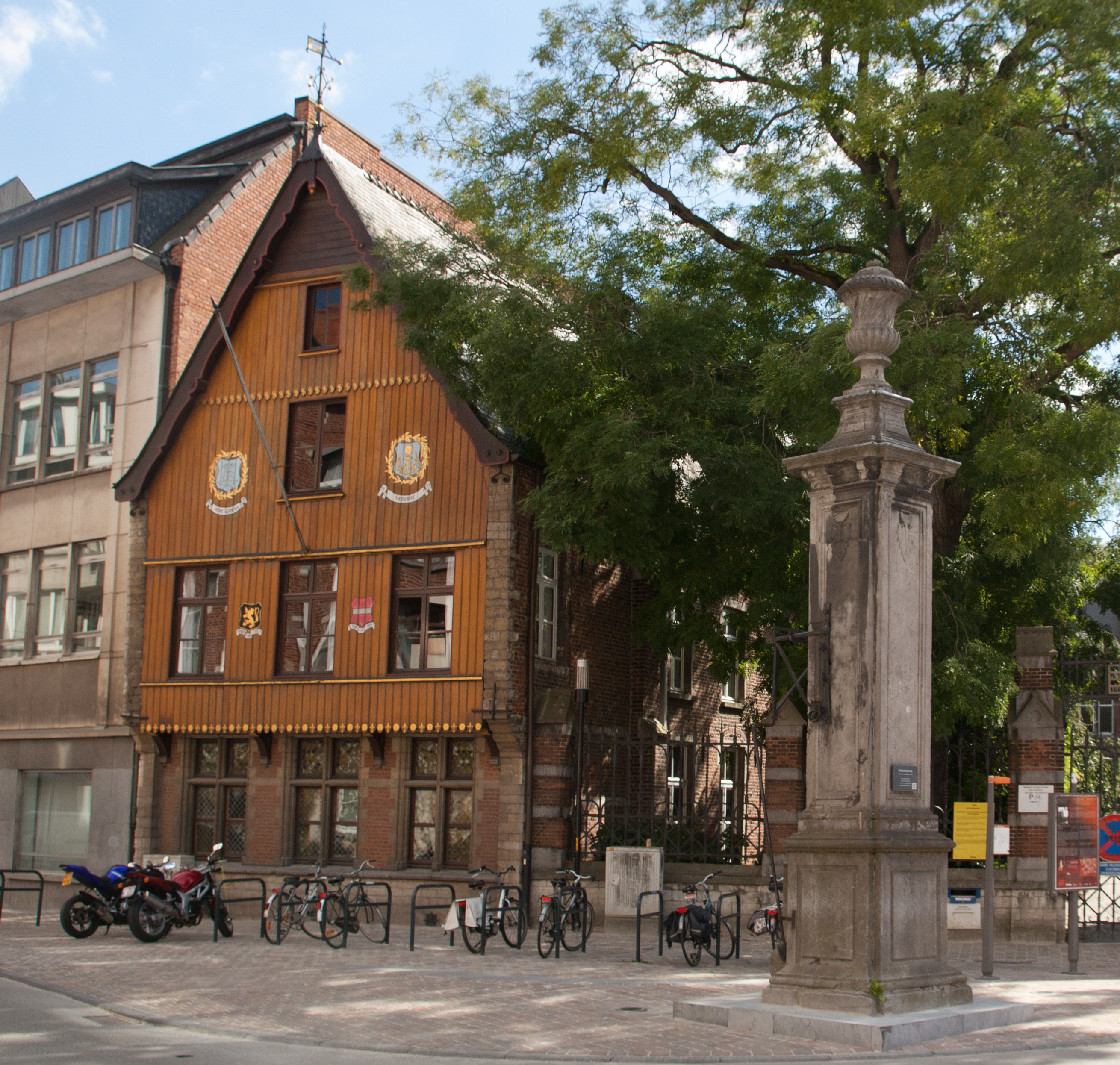 Entree tot het Hoger Instituut voor Wijsbegeerte te Leuven